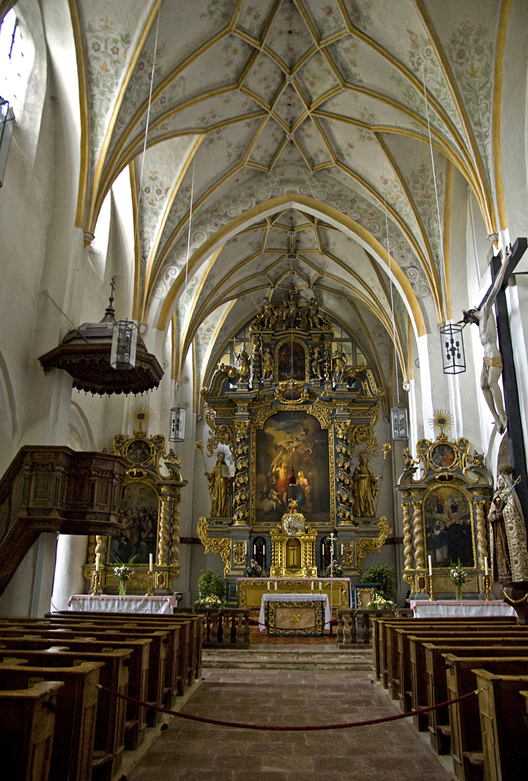 Interior of Münster Frauenchiemsee